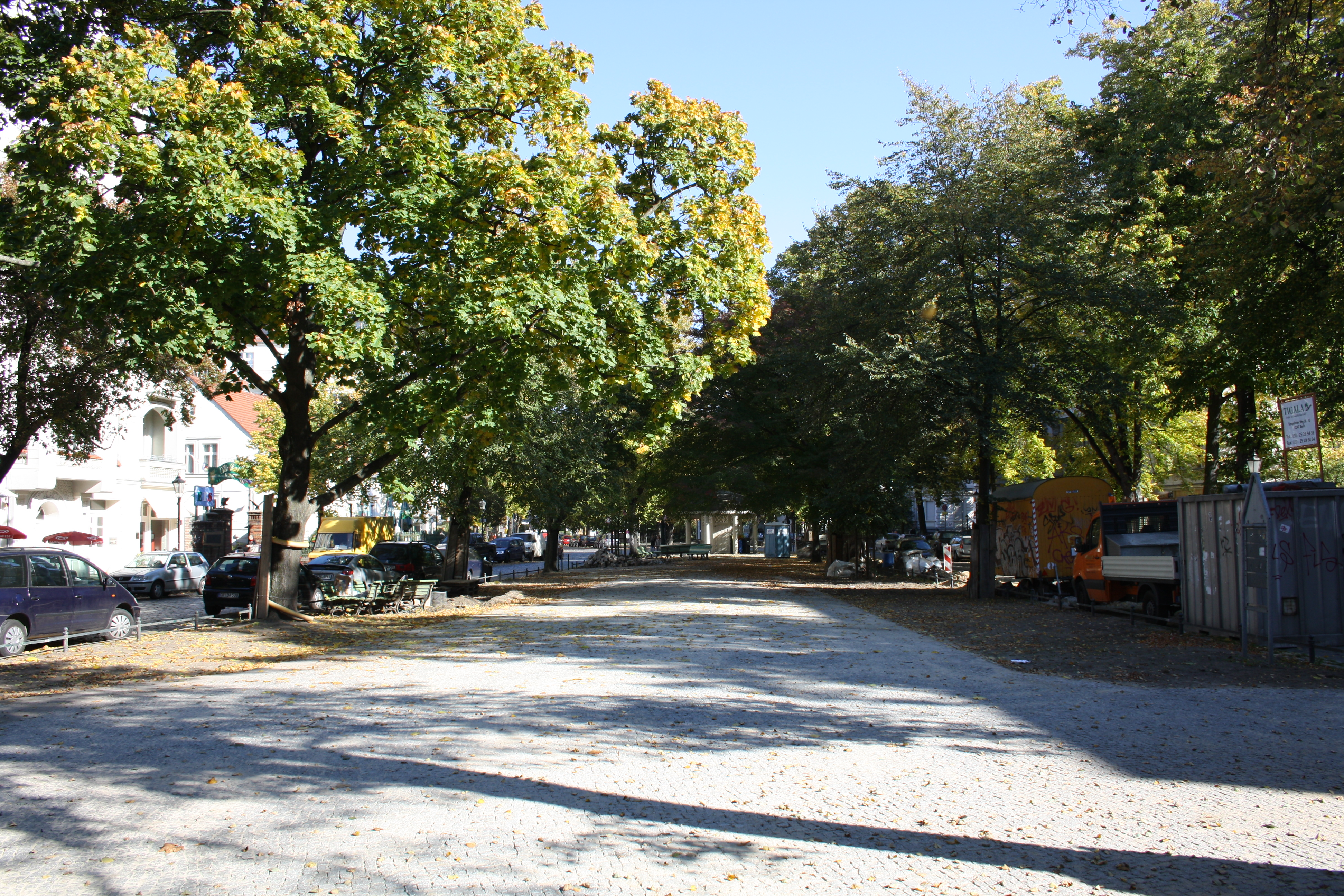 Richardplatz in Berlin-Neukölln